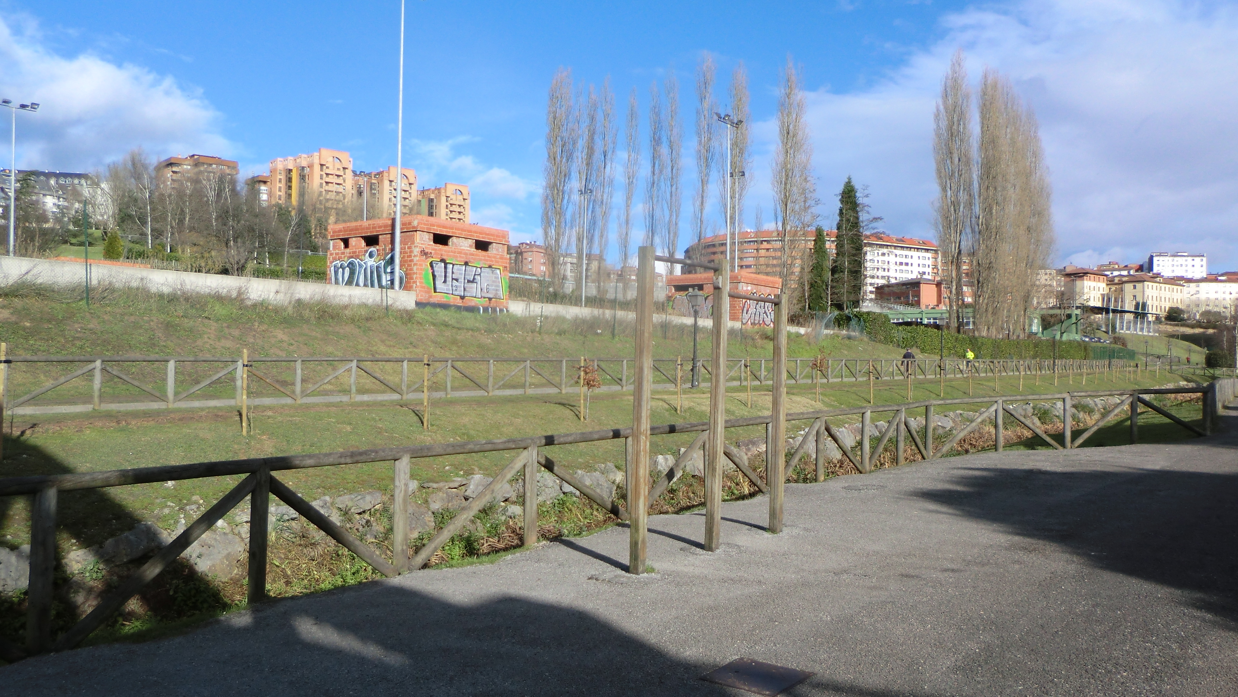 Klimmstange im Parque de Invierno